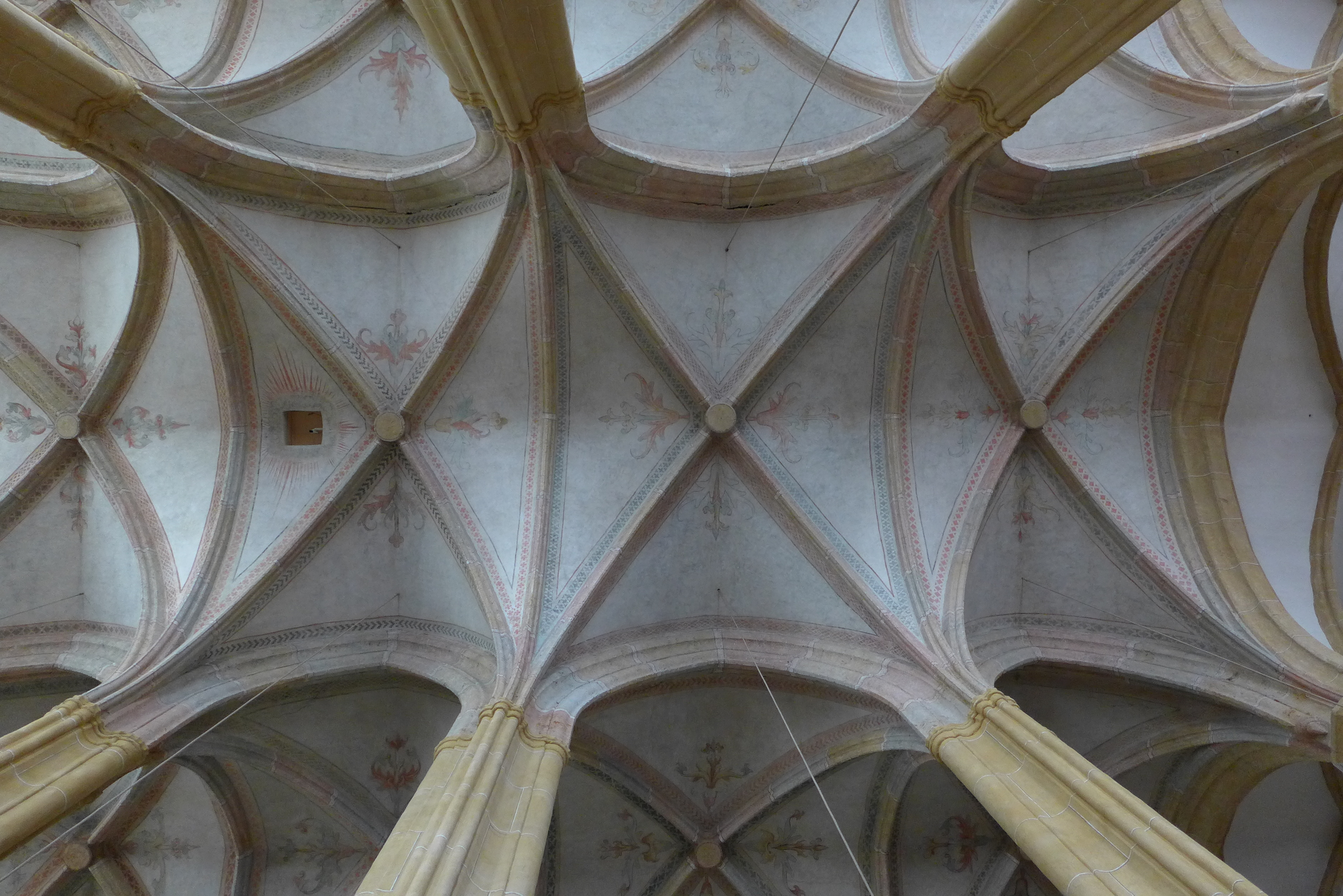 Stift St. Lambrecht - gotisches Kreuzrippengewölbe in der Stiftskirche